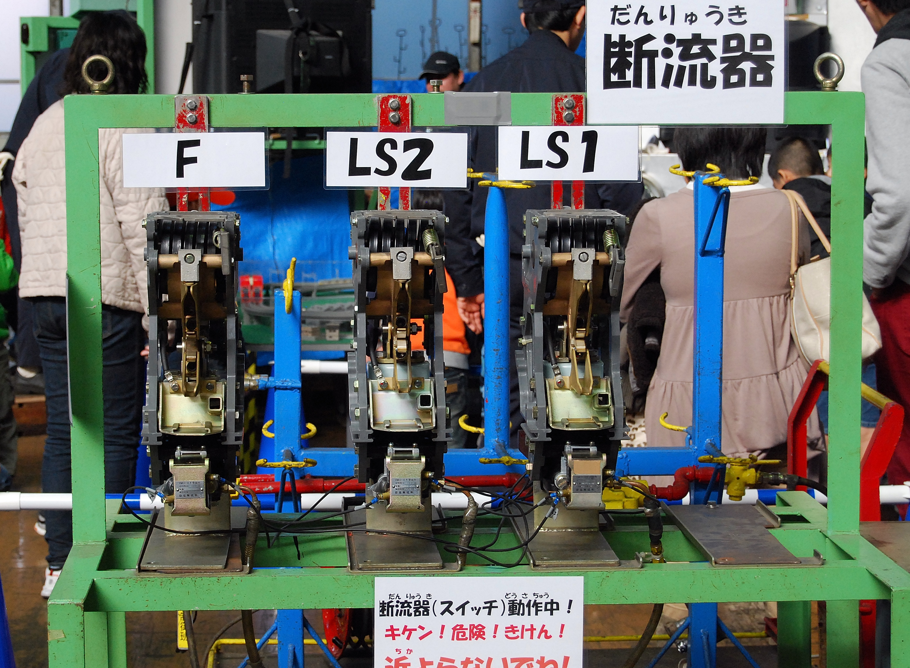 鉄道車両の断流器（スマイルフェスタ2010イベントでの綾瀬車両基地開放時に撮影）